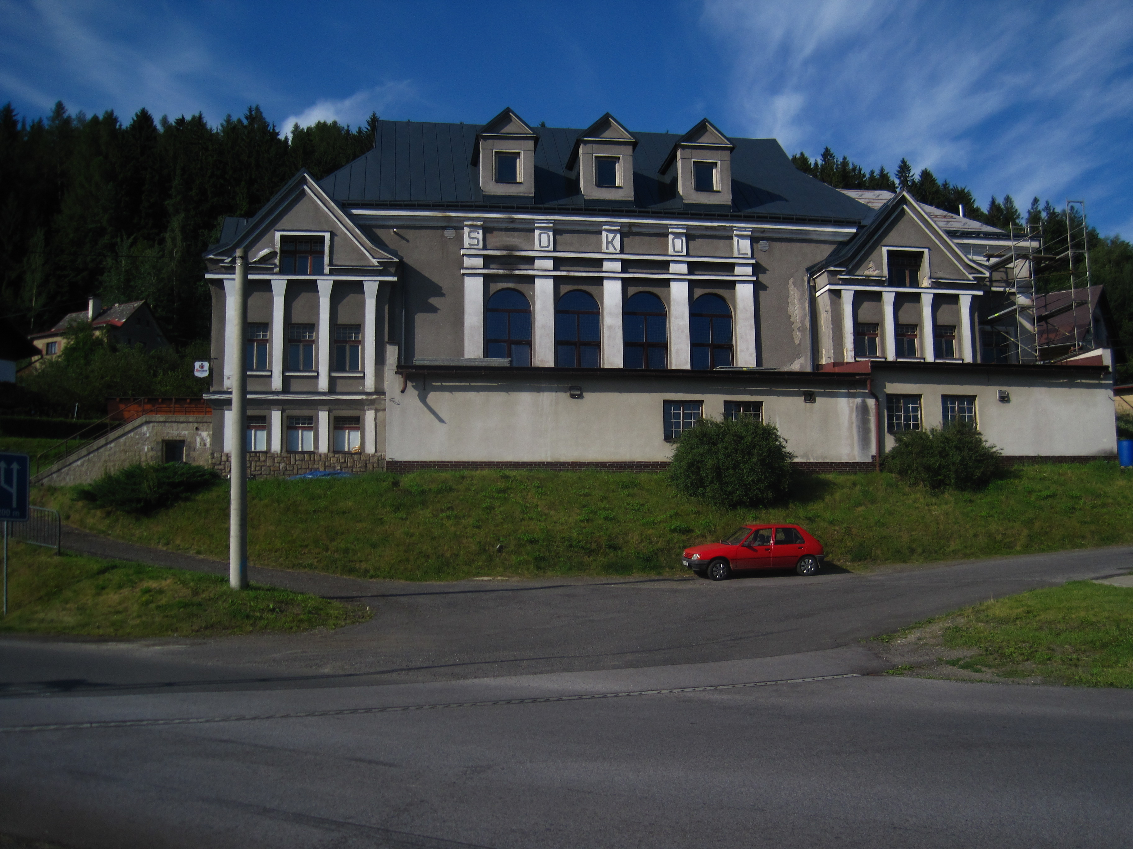 Plavy - sokolovna čp. 140